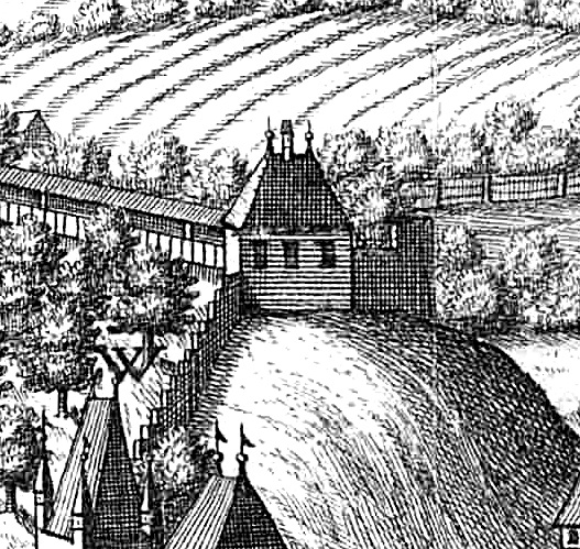 Balsschlösschen (Ottonianum) nach einem Stich von Michael Wening Ausschnitt von File:Michael Wening Landshut 1723.jpg